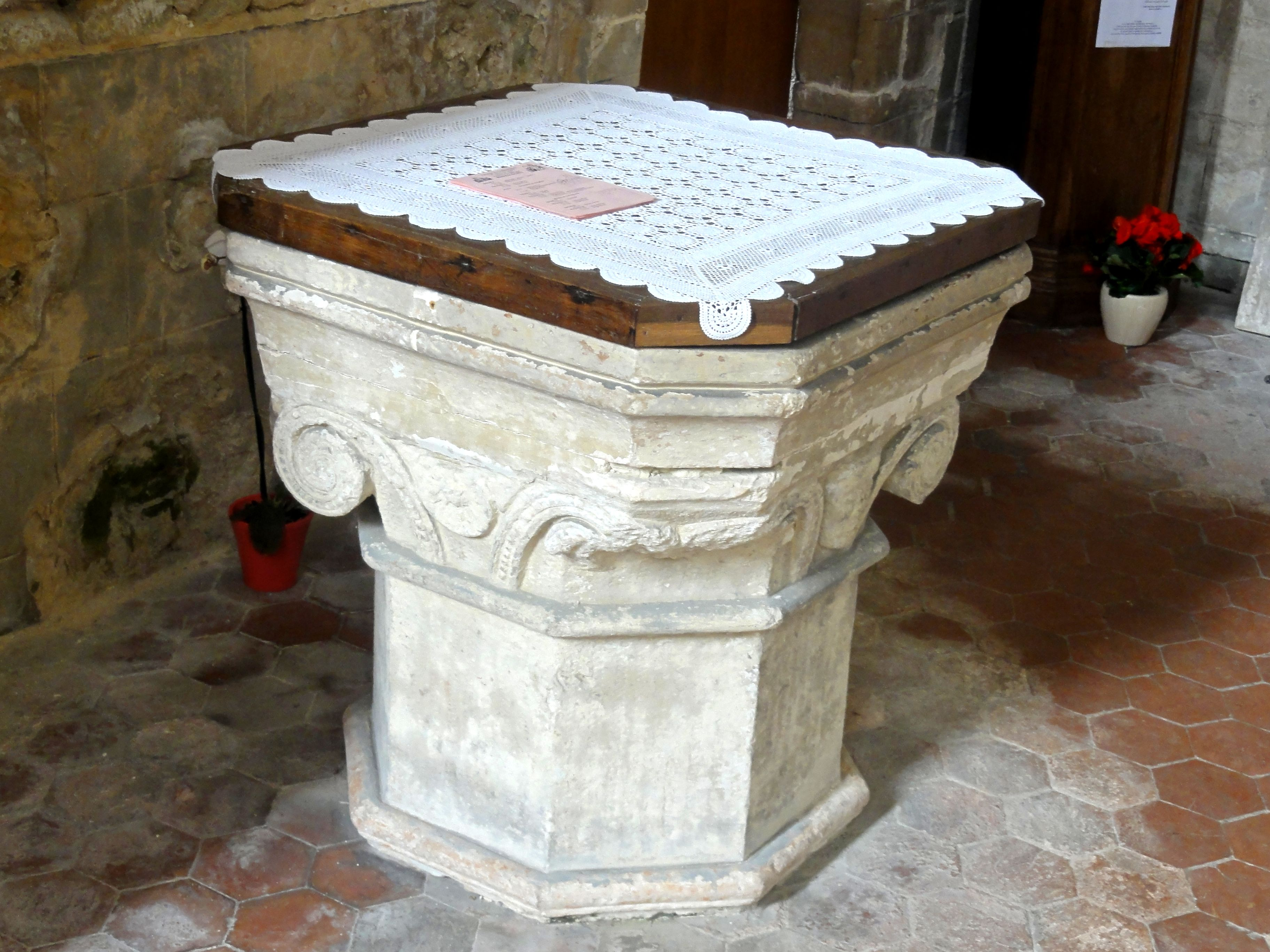 Fonts baptismaux.